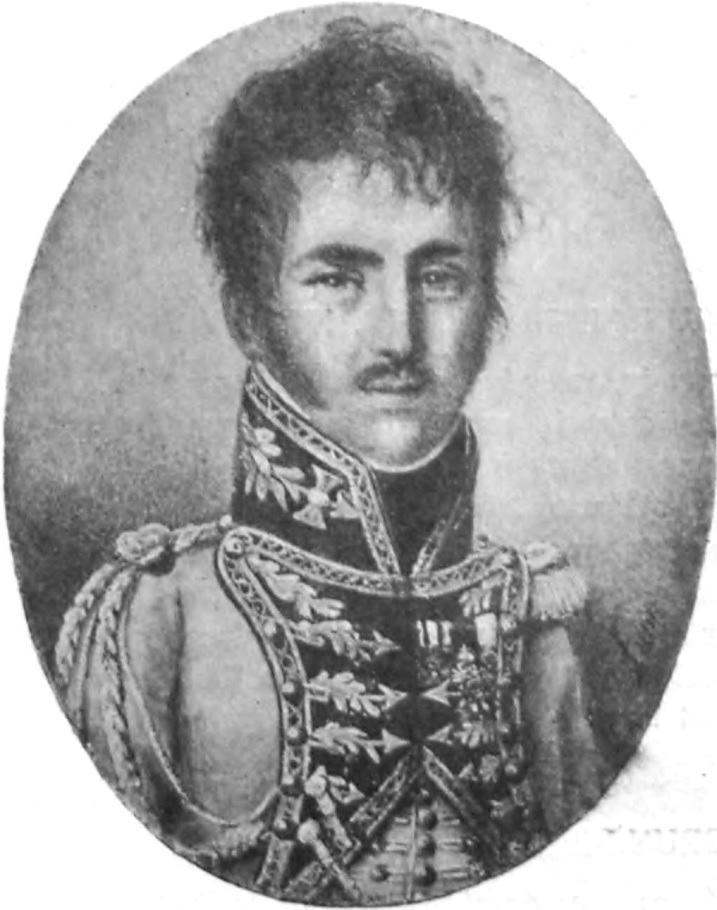 Antoni Jankowski (1783-1831) w balowym mundurze pułku lekkokonnego